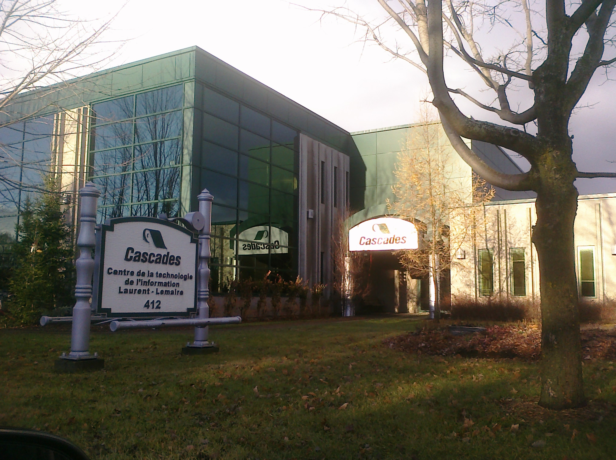 Centre des technologies de l'information, Cascades